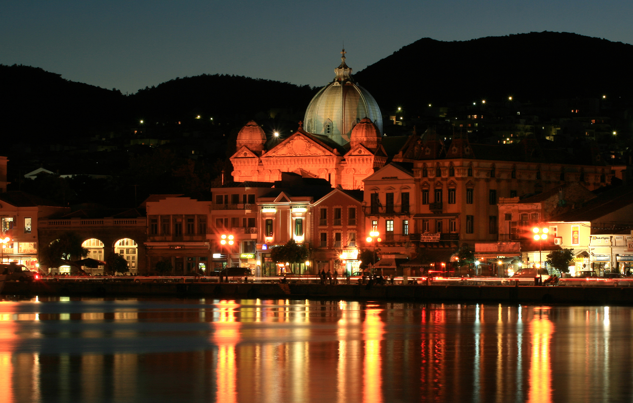 Ναός Αγίου Θεράποντα Μυτιλήνης«Ναός Αγίου Θεράποντα Μυτιλήνης»